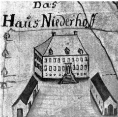 Haus Niedernhofen, auf der Karte der Böhler Markenteilung von 1770